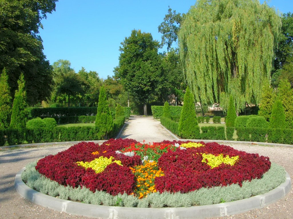 Skwer im. Mariana Turwida na Sielance w Bydgoszczy